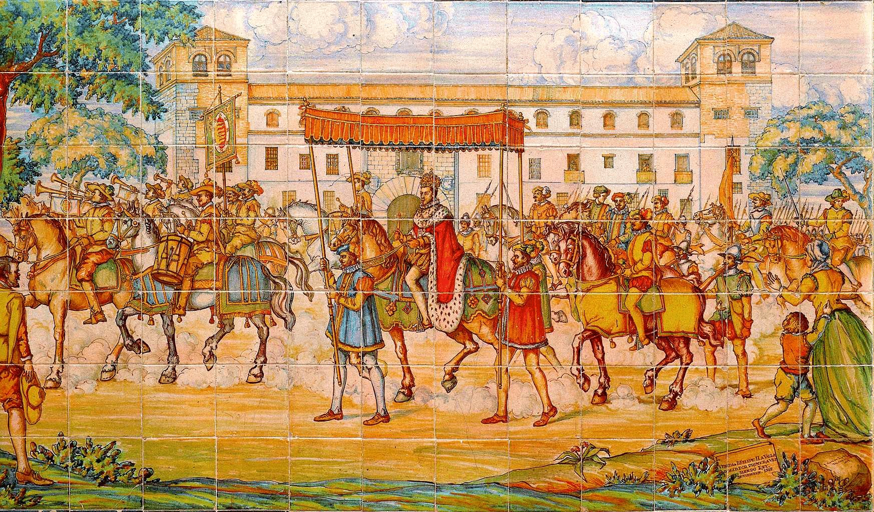 Venida_Felipe_II_a_Valladolid